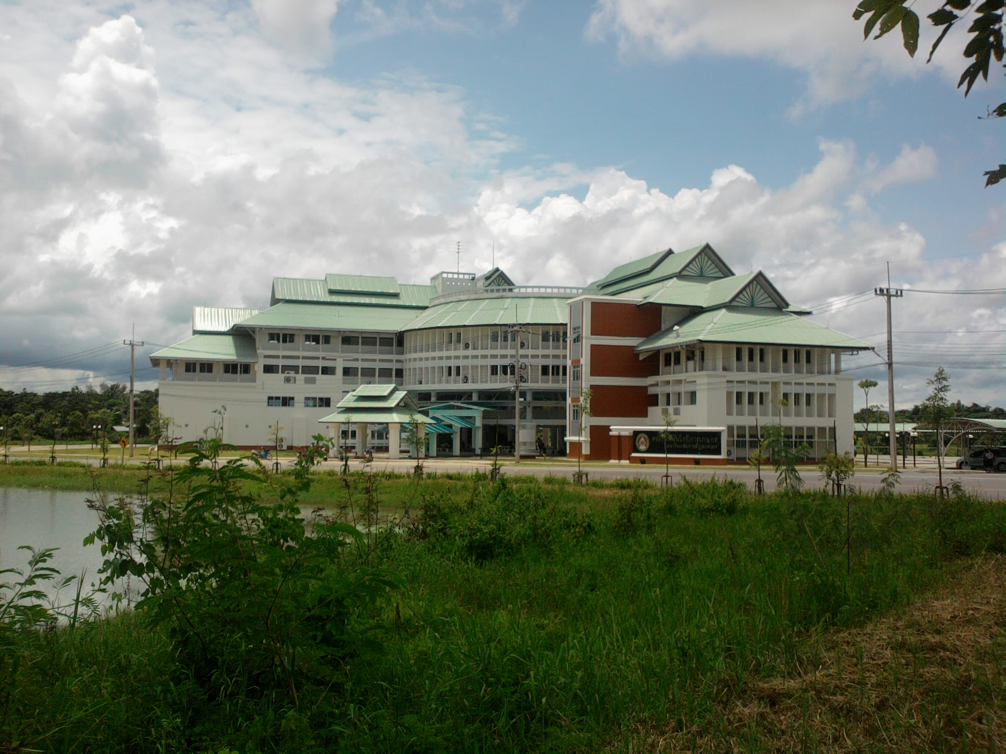 มหาวิทยาลัยราชภัฏสกลนคร